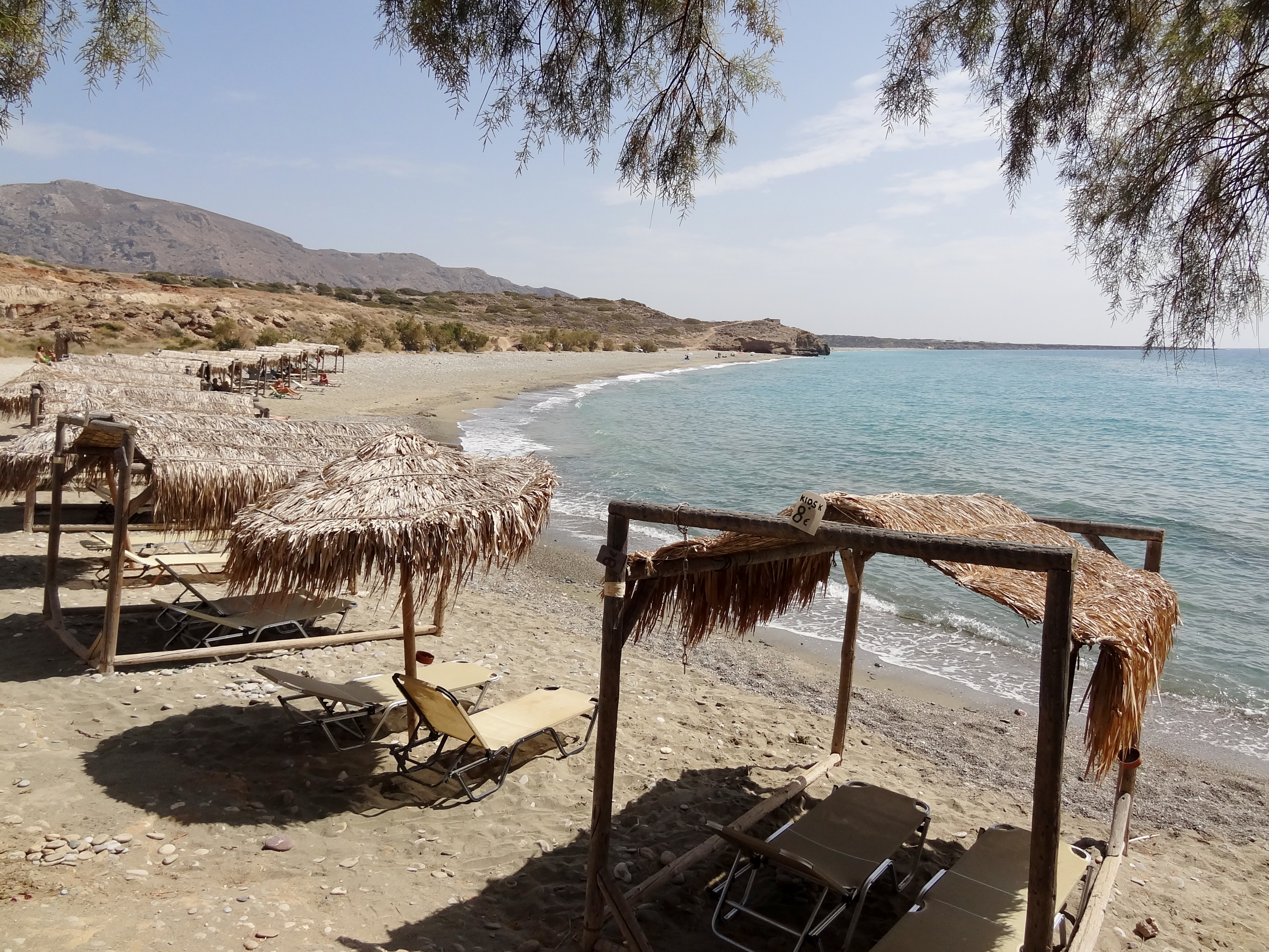 Strand von Diaskari (Παραλία Διασκάρι), Gemeinde Sitia, Kreta, Griechenland